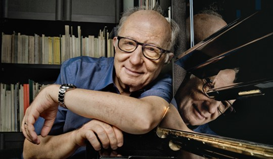 פרופסור למוסיקה יצחק סדאי